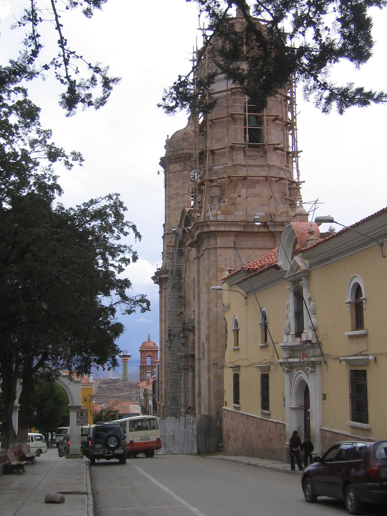 En primer plano en obras la Catedral de Potosí, en segundo plano la Torre de la Compañia simbolo de la ciudad y en tercer plano al fondo el restaurante giratorio Pari Orcko.